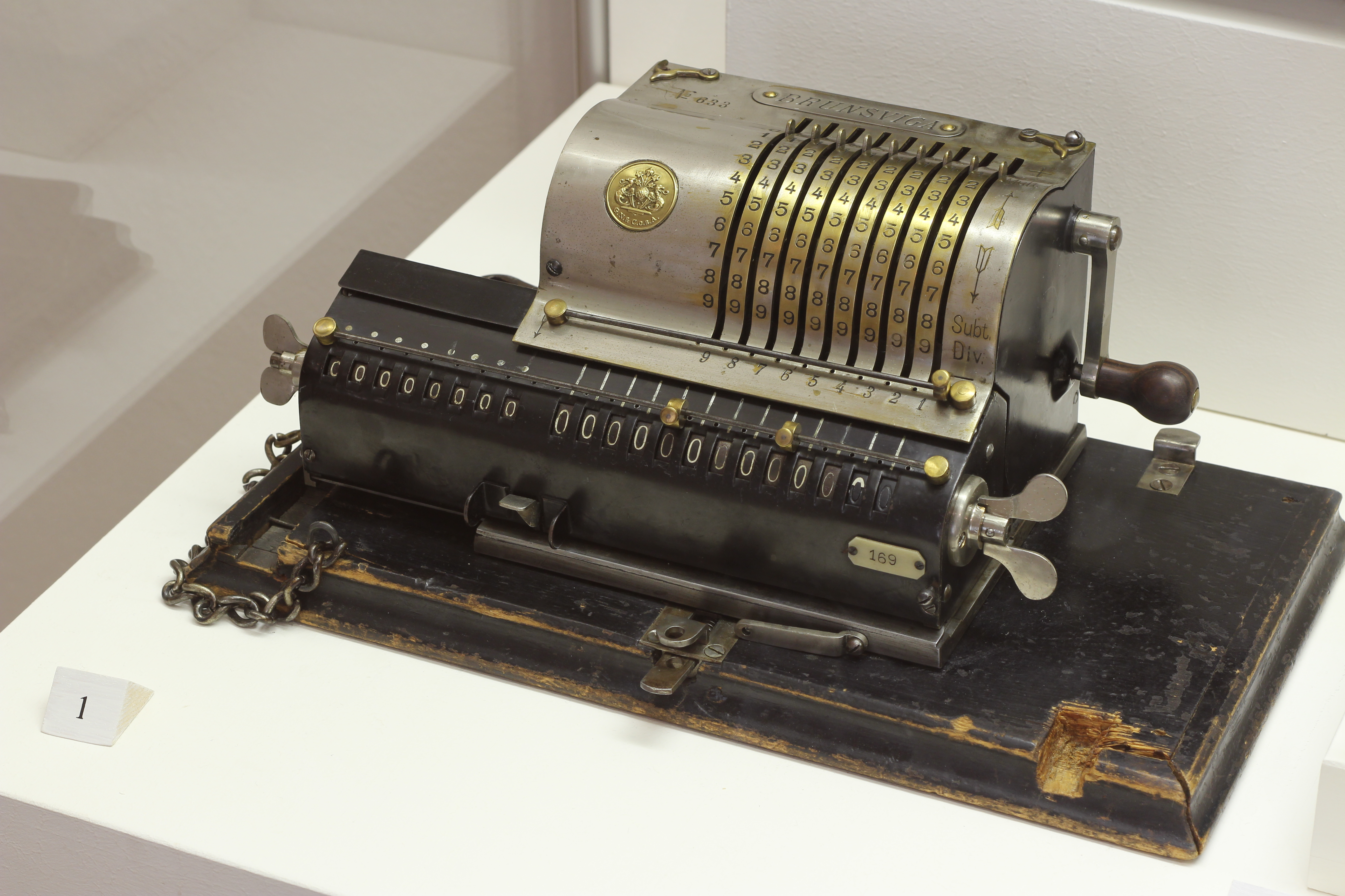 Braunschweigisches Landesmuseum. Wikimedia Deutschland. Juni 2014.